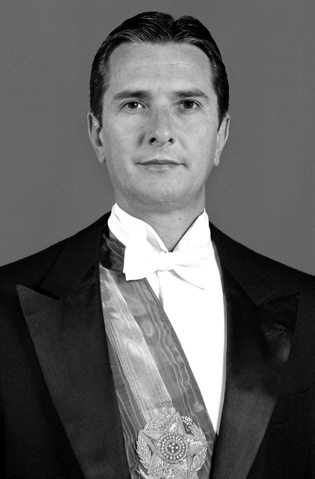 Imagem oficial em Preto e Branco do Presidente da República Federativa do Brasil, Fernando Collor.